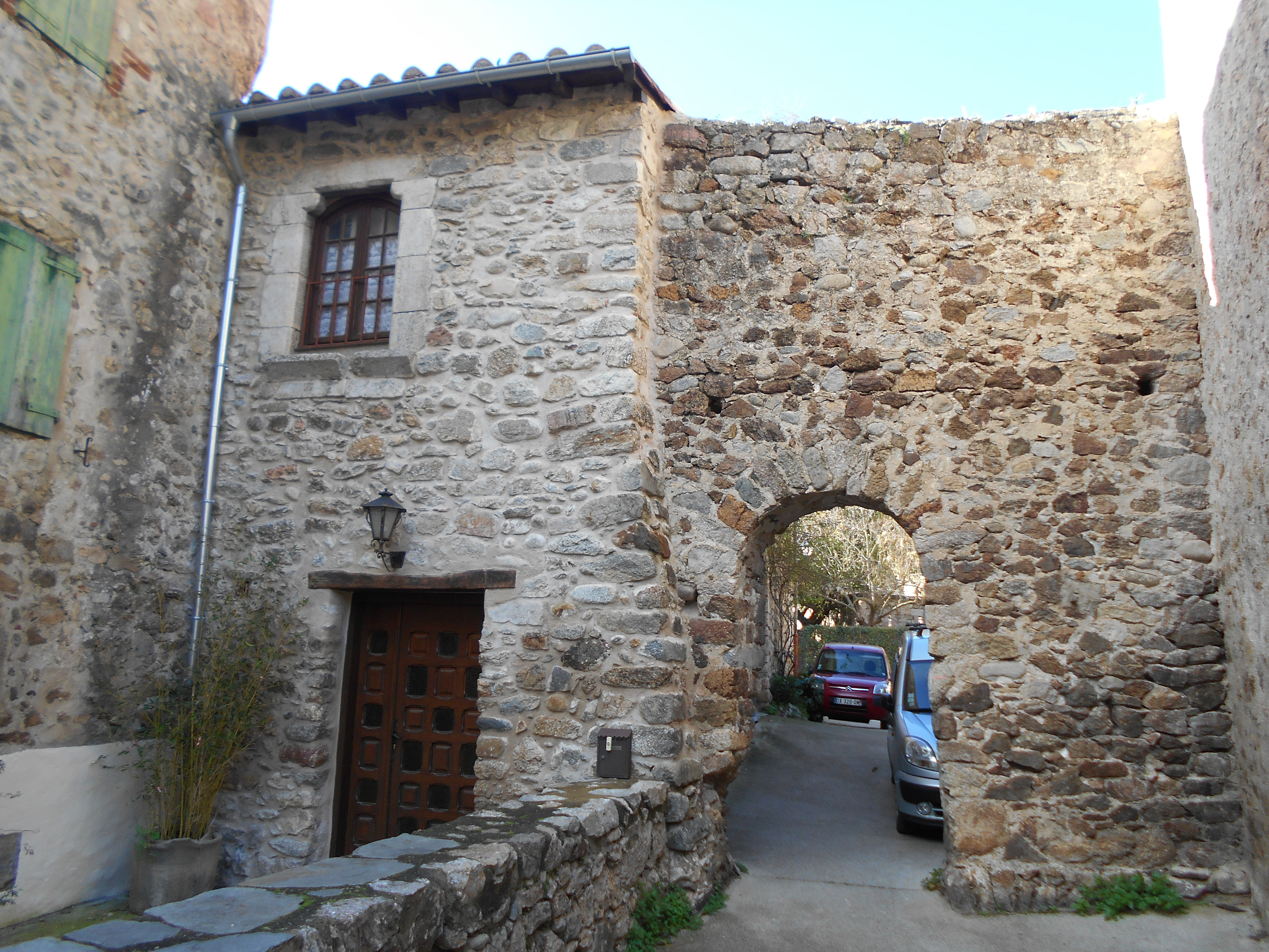 Casa de l'11 del carrer dels Teixidors, de Vilafranca de Conflent